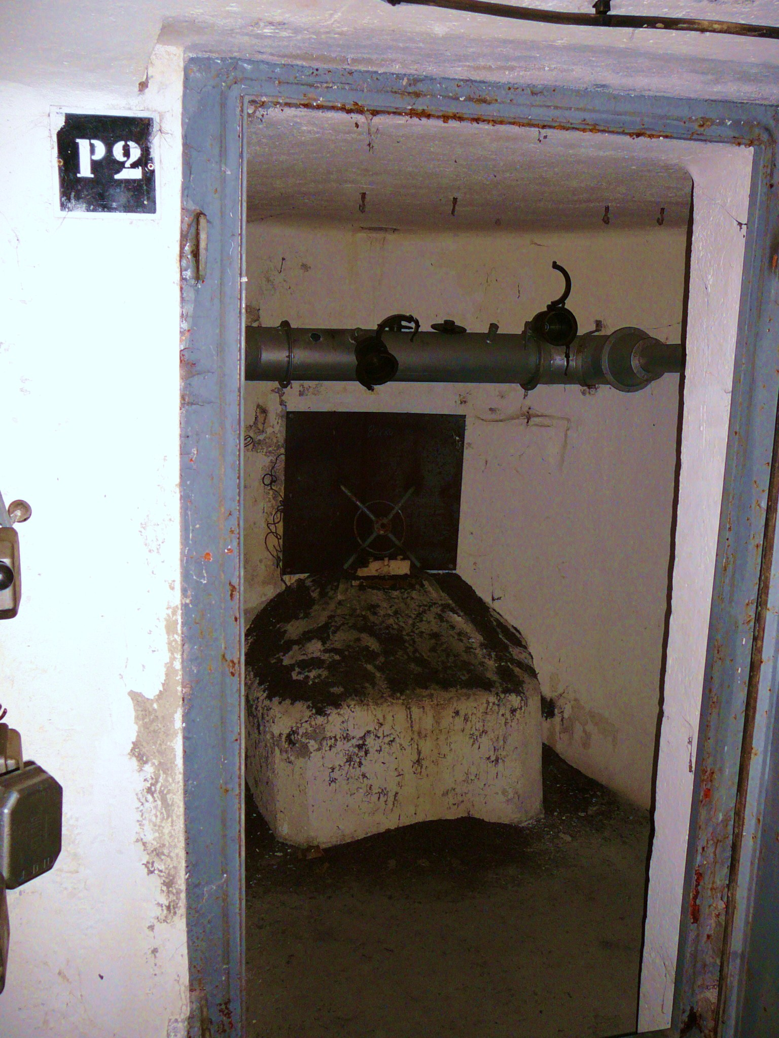 Interno opera 4, sbarramento tenne